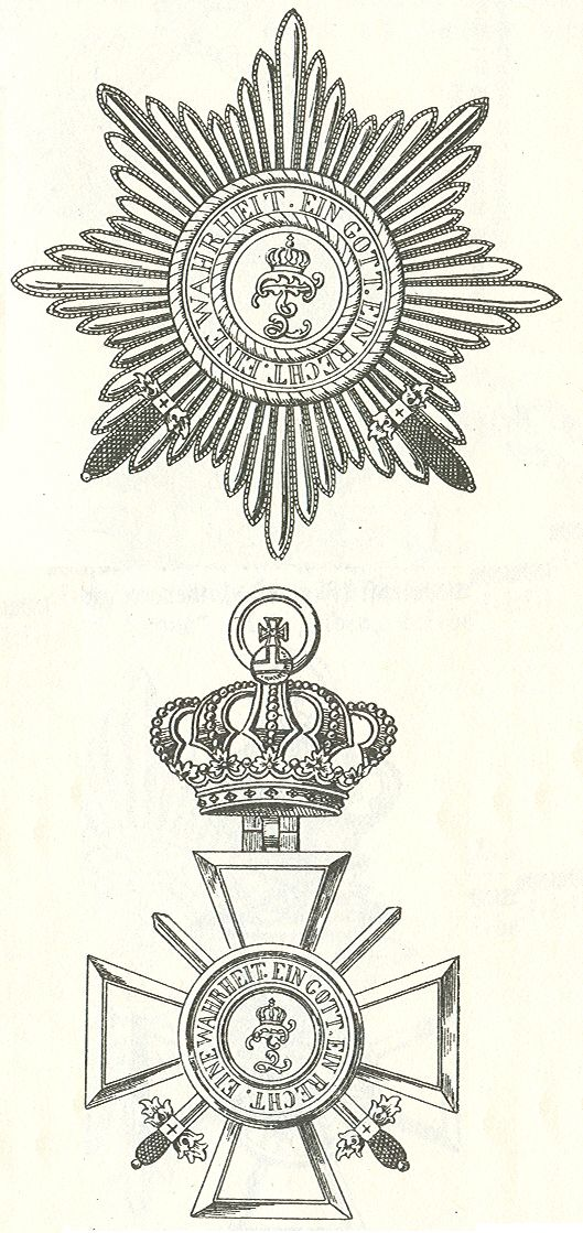 Oldenbutgse Haus- und Verdienstorden des Herzogs Peter Friedrich Ludwig